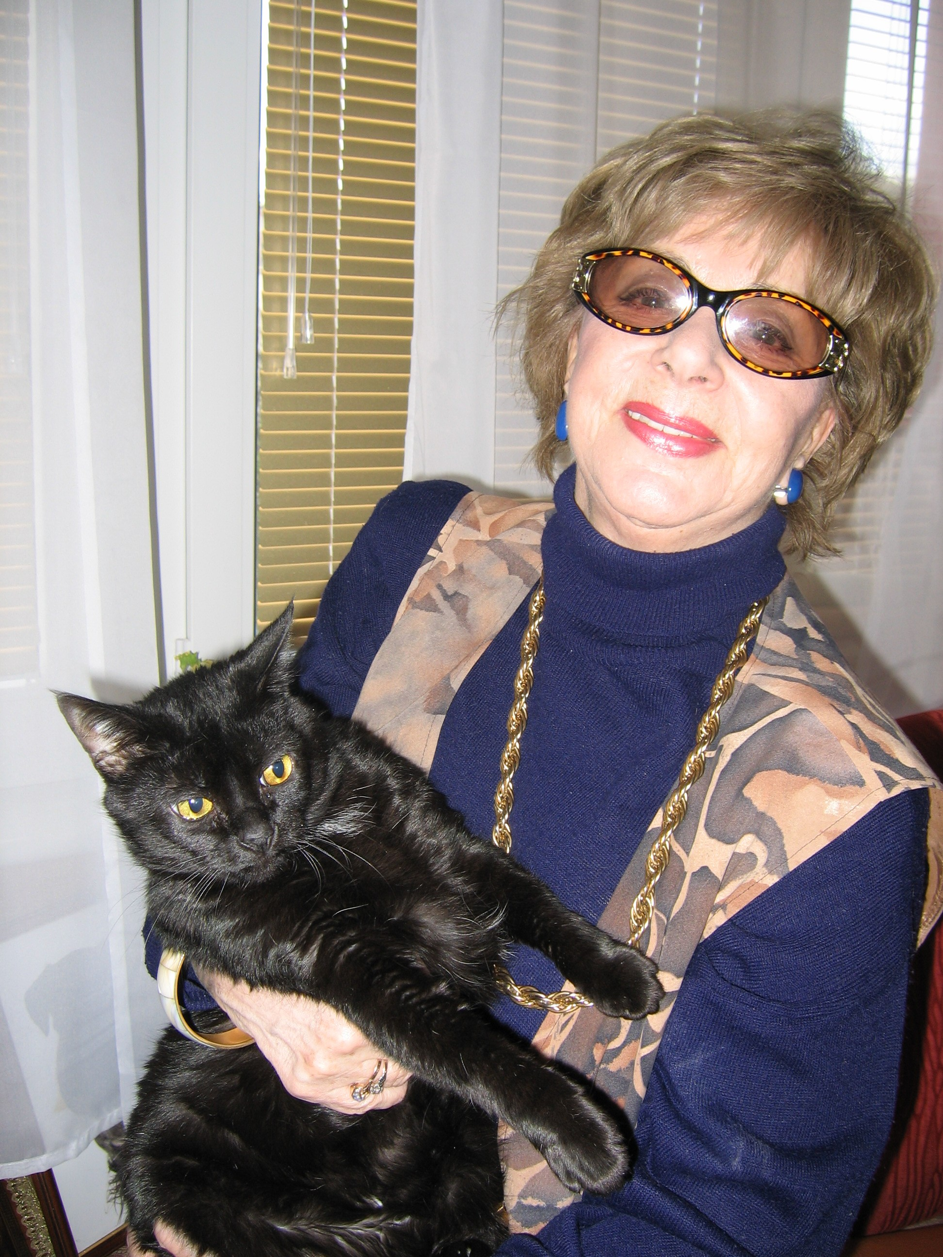 Zofia Czerwińska, polska aktorka (z kotką o imieniu Agata).